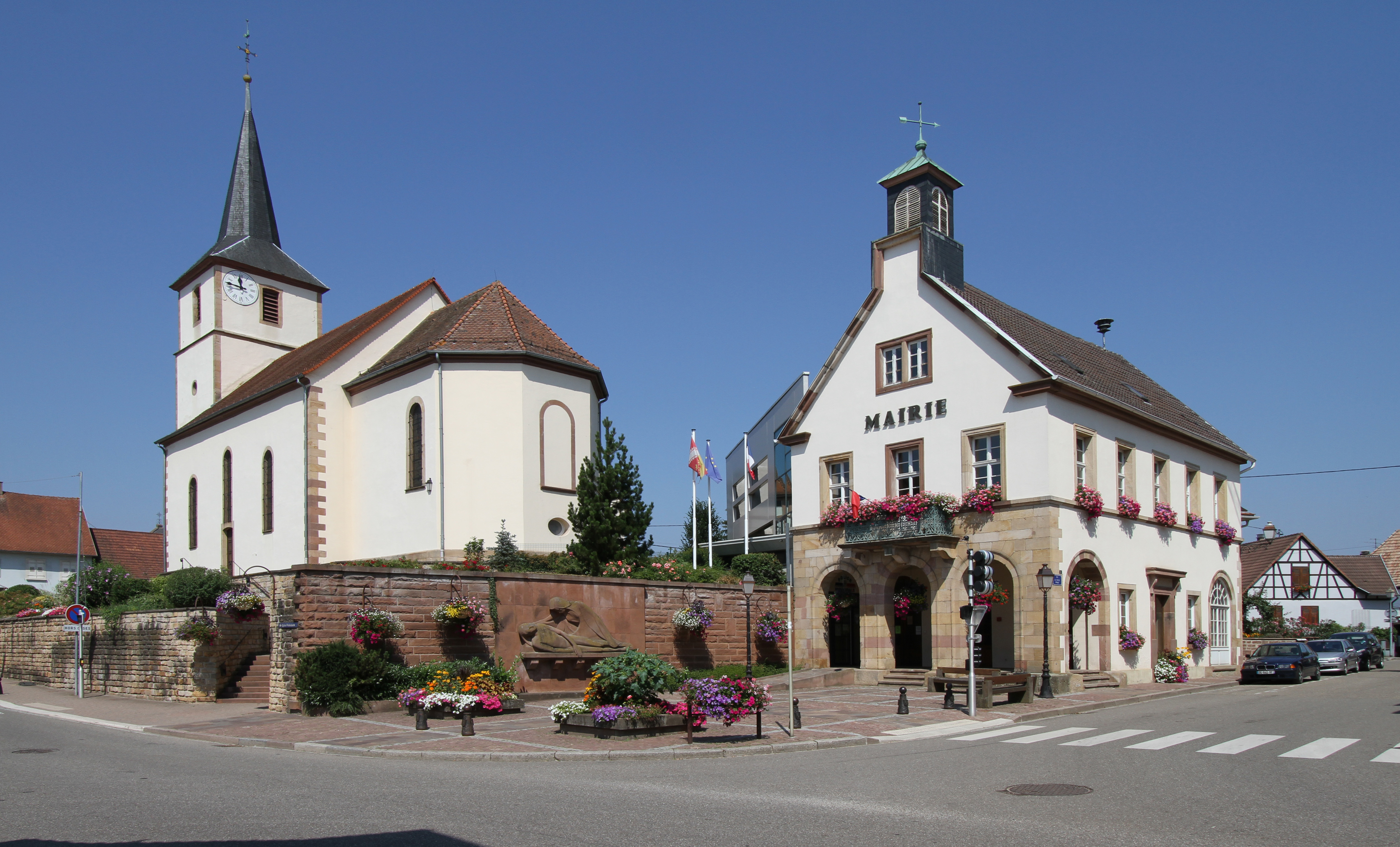 Protestantische Kirche und Rathaus in Betschdorf.